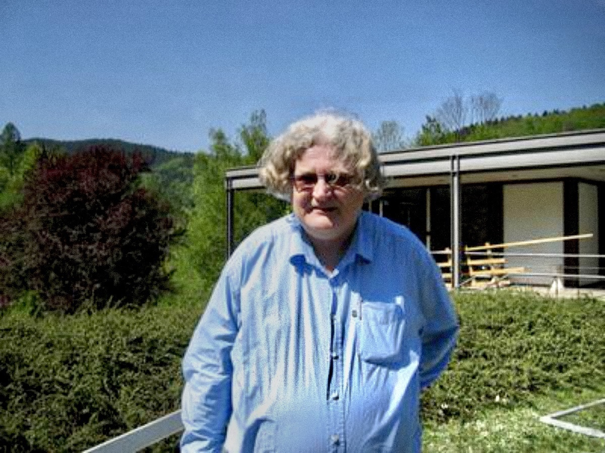 Foto di Jens Carsten Jantzen